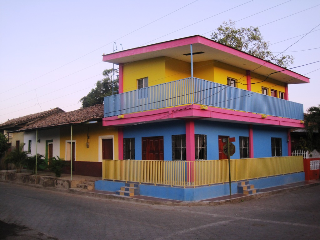 Casa en Achuapa, Nicaragua